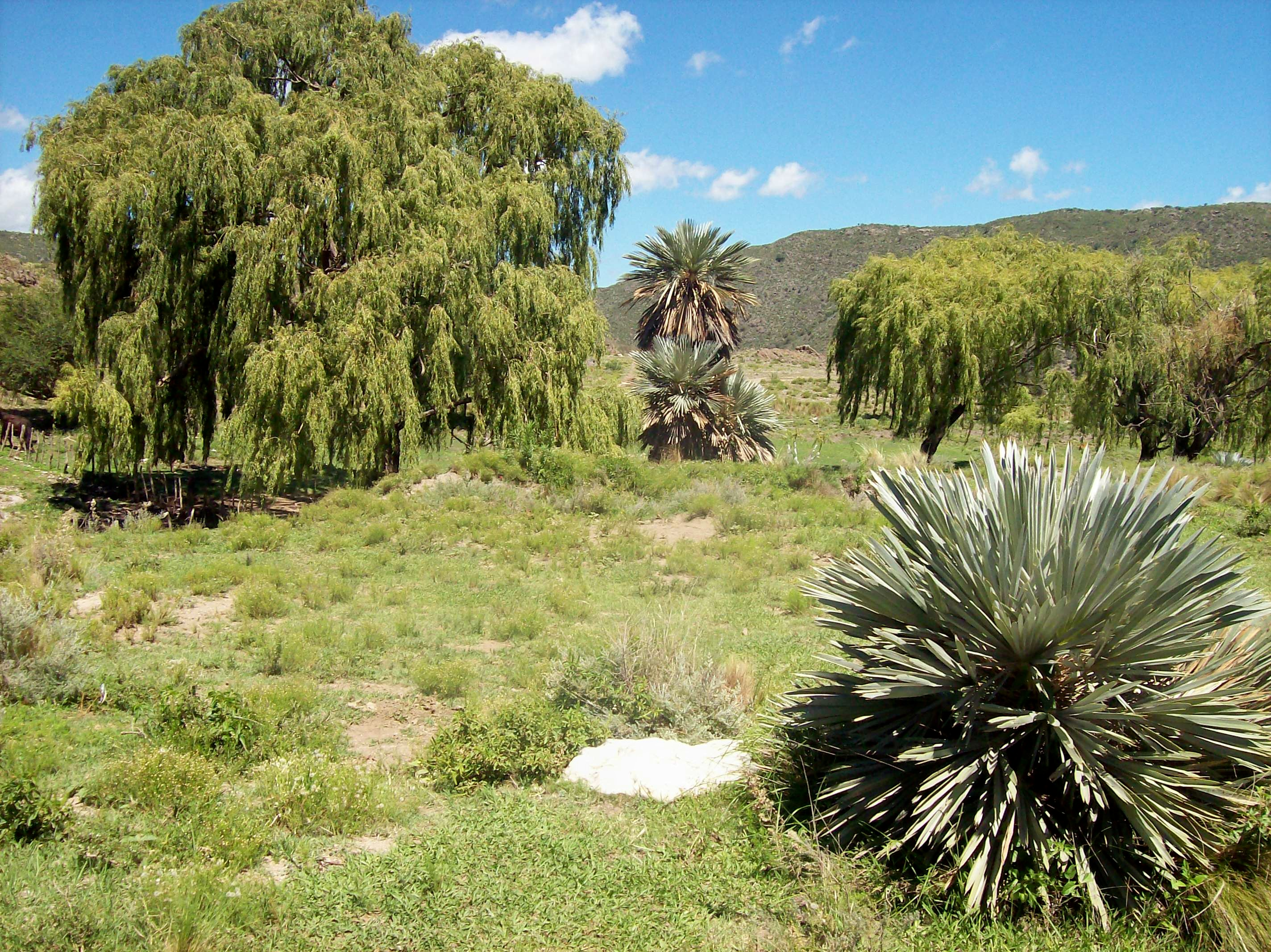 Palmeras Caranday "Camino de los Túneles", de la ruta provincial 28, Córdoba, Argentina.